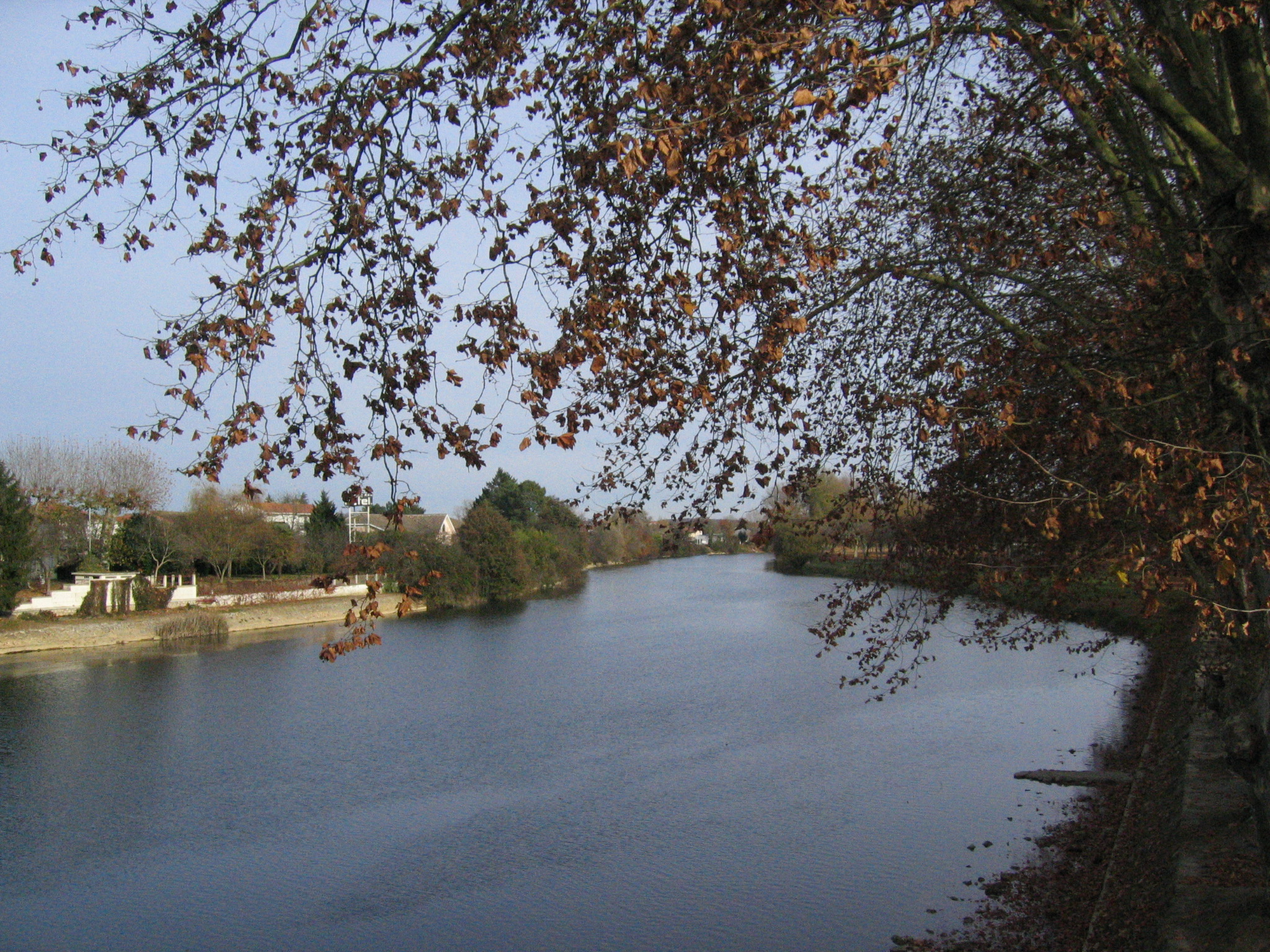 Ce fleuve est large et majestueux dans cette ville.